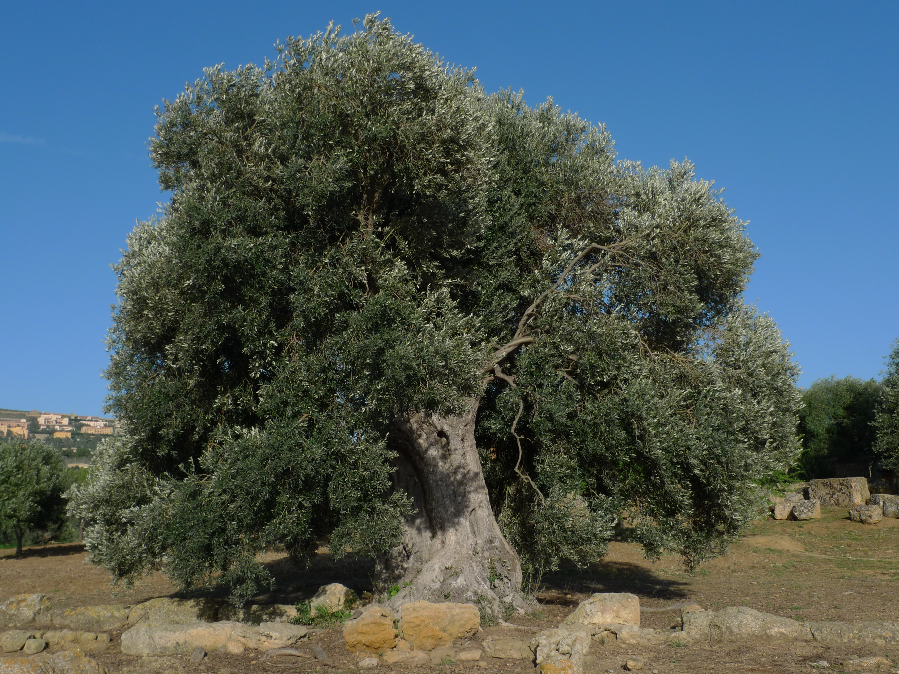 valle dei templi, agrigento, sicilia, italy